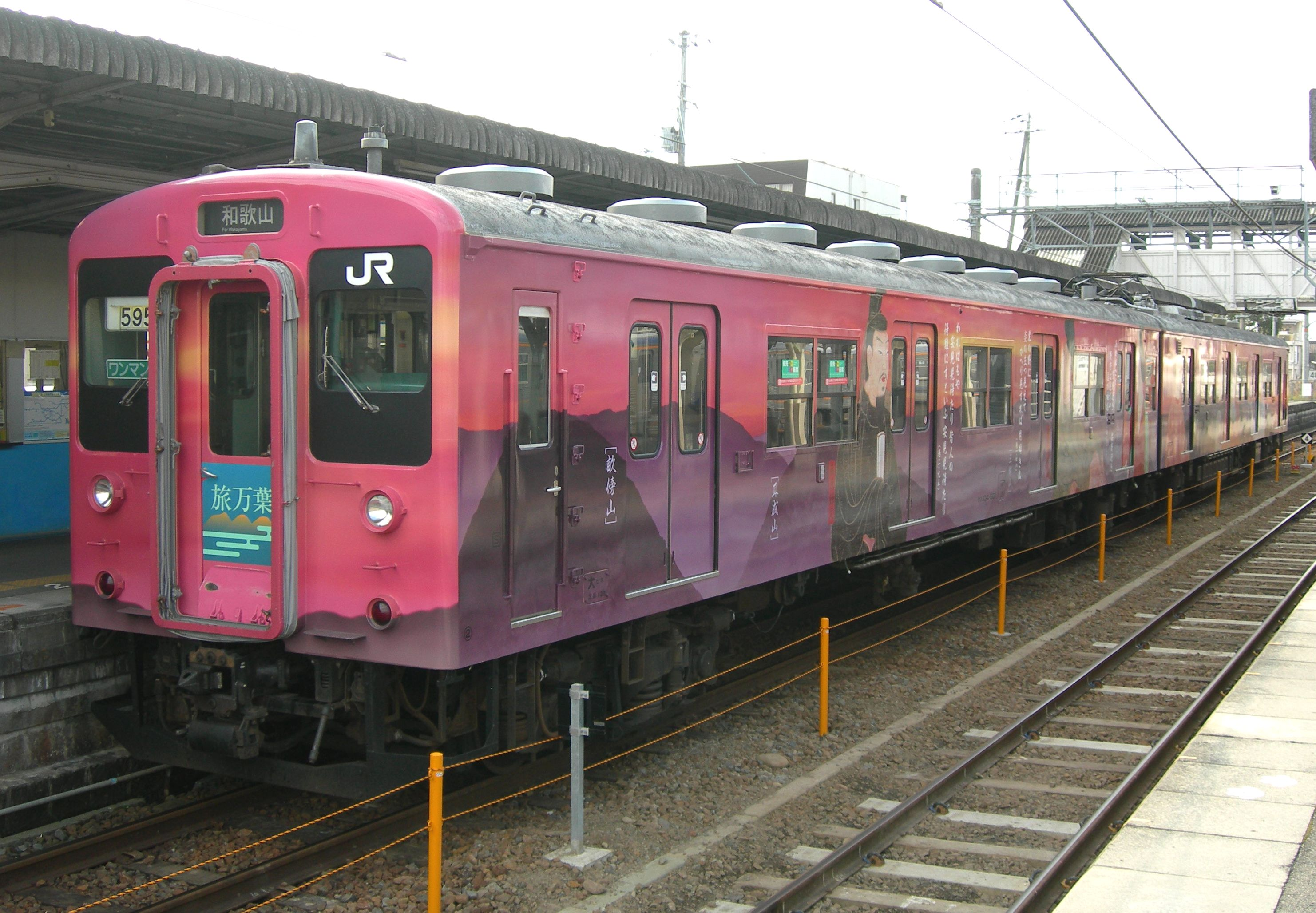 西日本旅客鉄道 105系 「旅万葉」